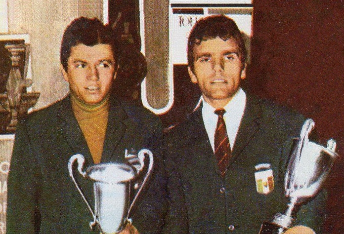 CAMPIONI dello SPORT 1973/74-Figurina n.356- PANTURU/FOCSENEANU -BOB-Rec